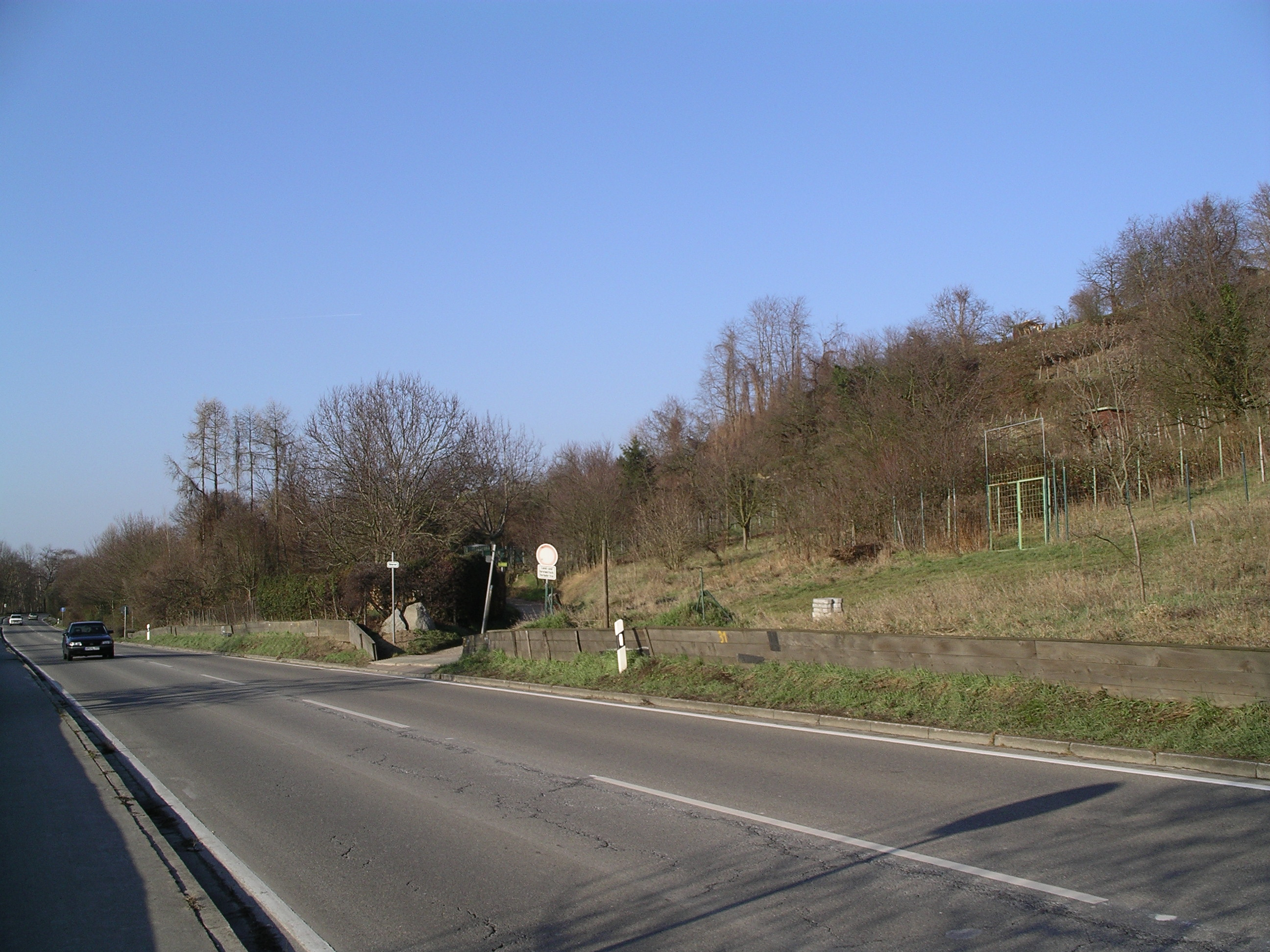 Die Chaussee (Bergstraße) von Hemsbach in Richtung Laudenbach, Höhe Umbühl (heute B3)